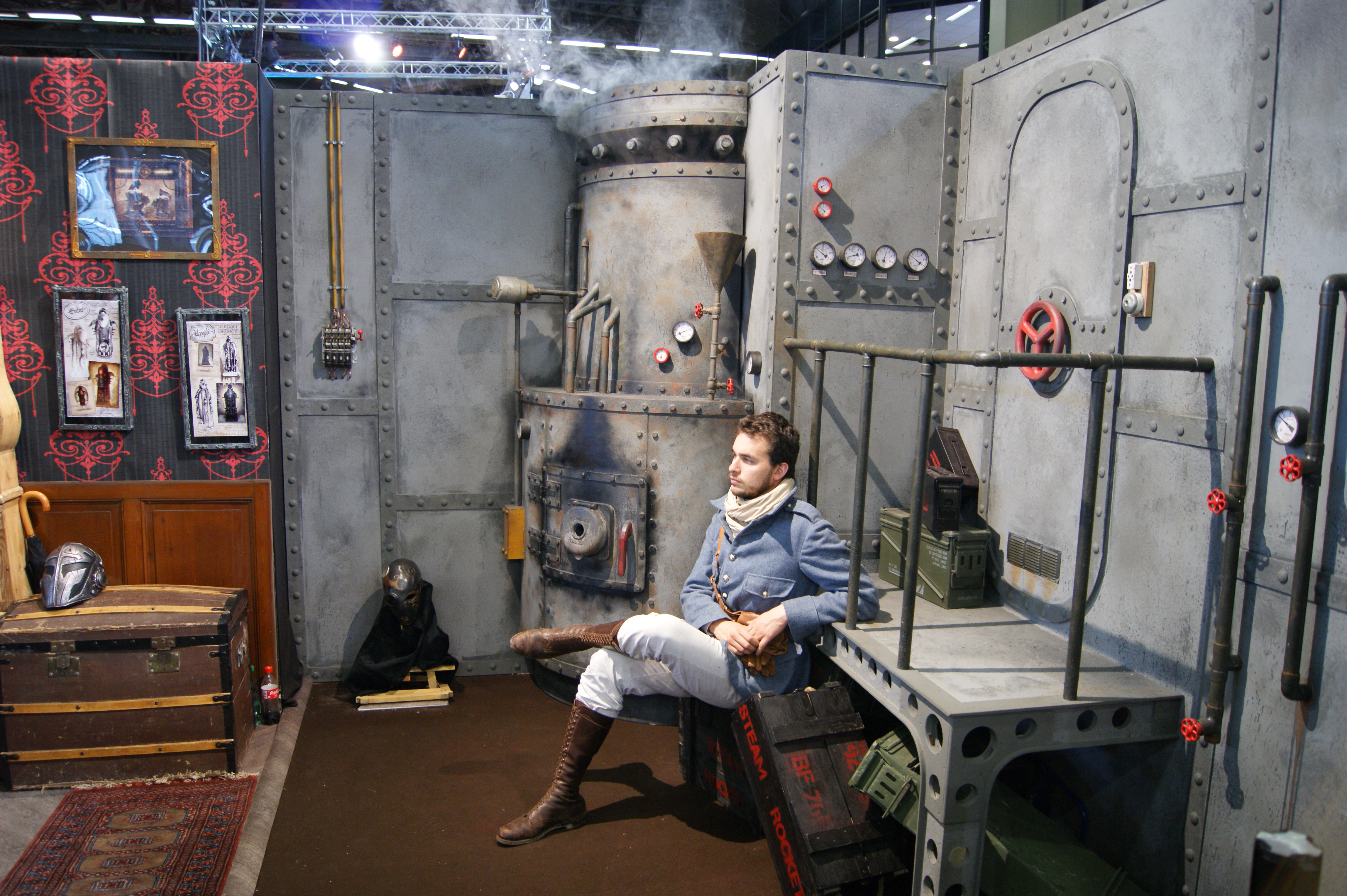 Stand de promotion du manfra City Hall, édité par Ankama Editions réalisé par l'association Steam Rocket